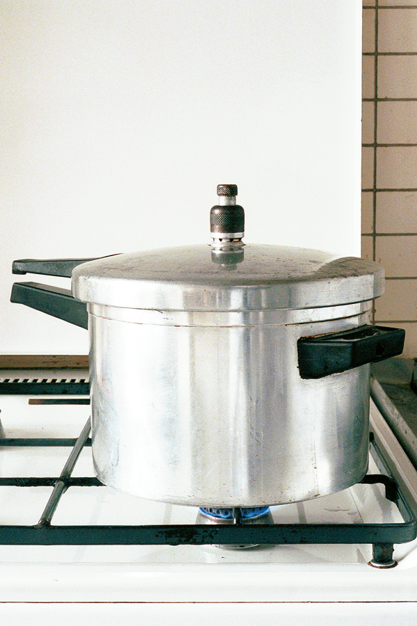 Kelomat Schnellkochtopf Modell 2. Aluminium, Bakelitgriffe schon eckig geformt. Überdruckventil mit 2 gefärbt-eloxierten Teilen, noch in Ausgangssposition; an der Basis des Schraubsockels etwa 8 Bohrungen zum Ausströmen von Dampf, wenn das Ventil anspricht.